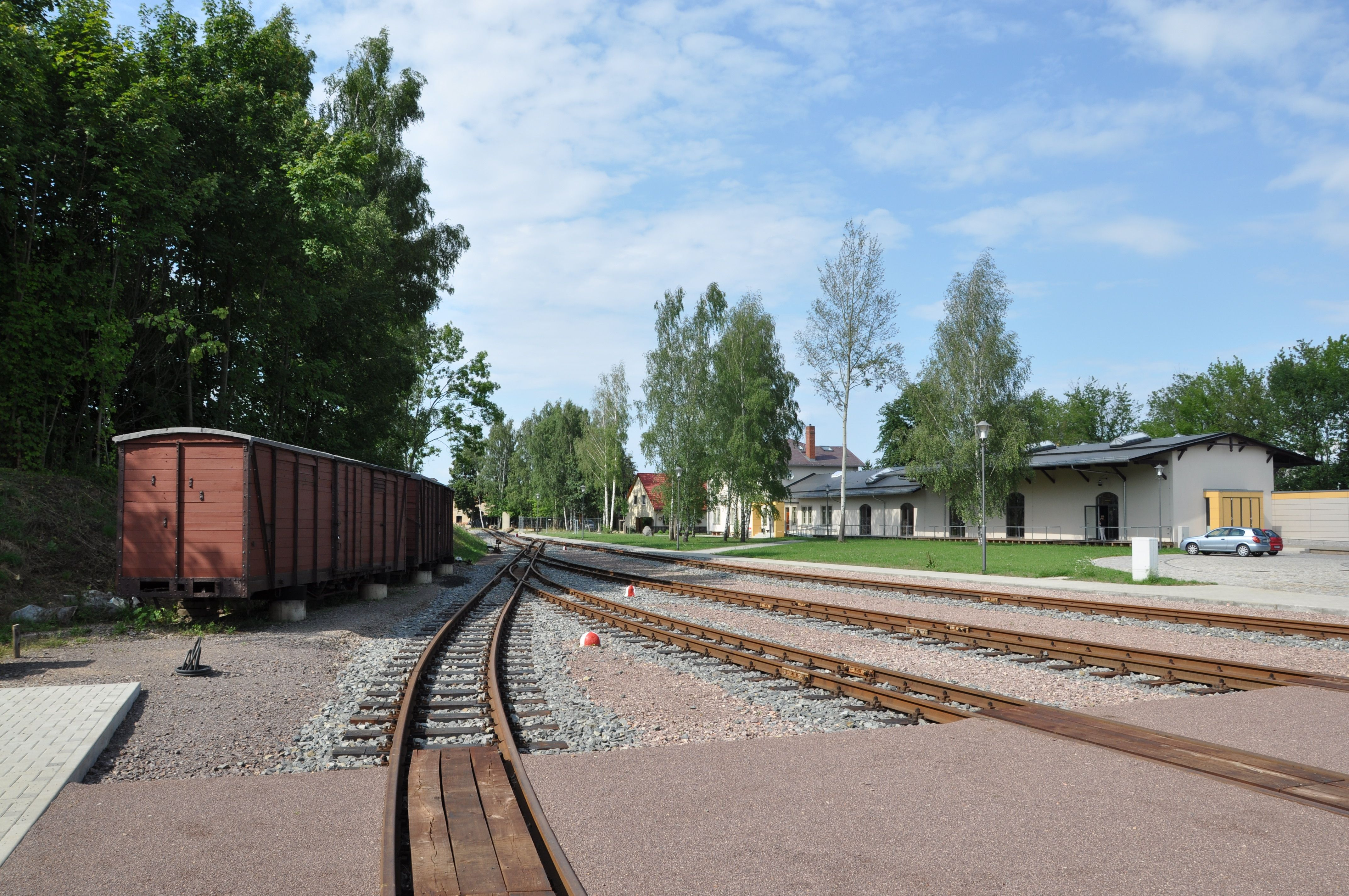 ehemaliger Bahnhof Wilsdruff, Museumsgleise